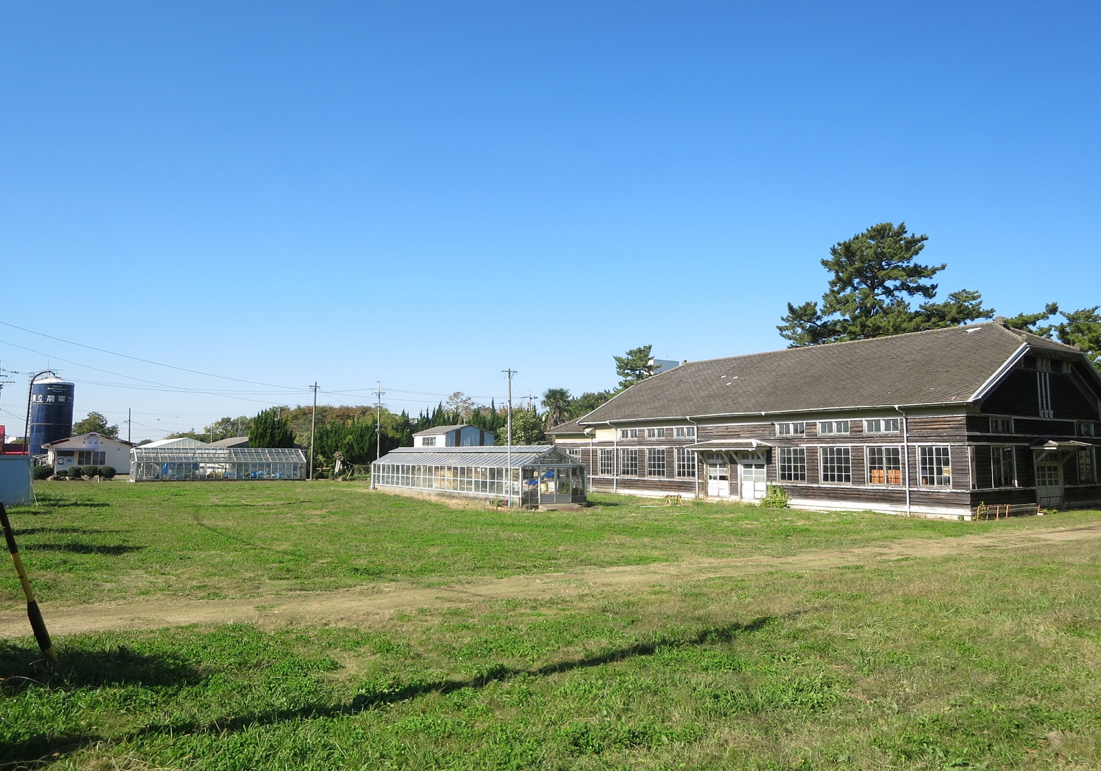 愛知県立農業大学校（岡崎キャンパス）